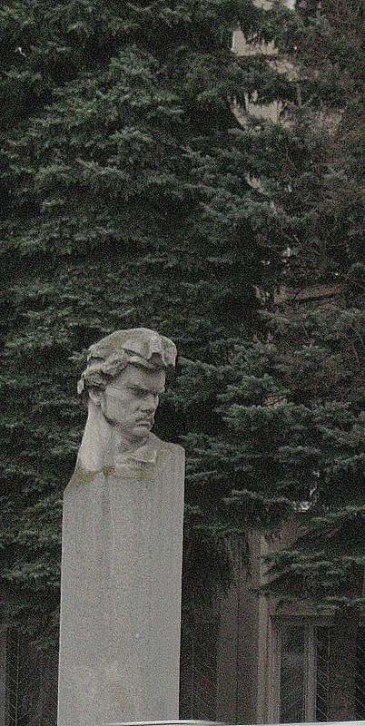 Памятник Затонскому в г. Хмельницкий